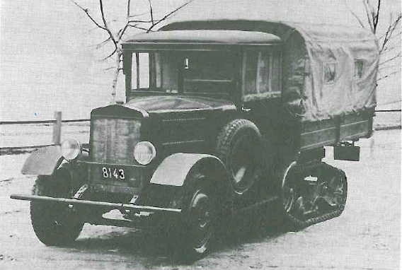 Samochód kołowo-gąsienicowy wz. 34 [opis oryginalny]